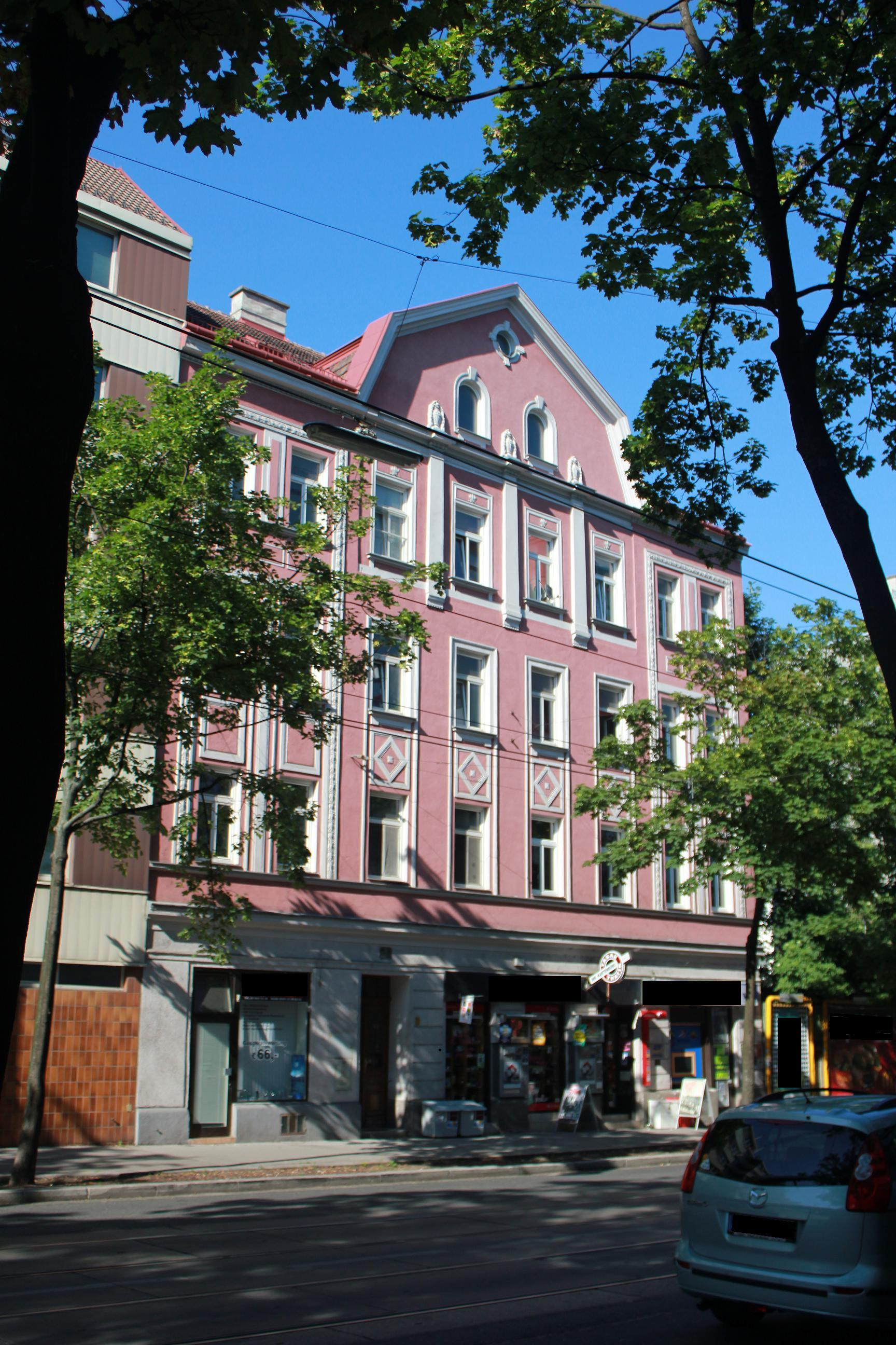 In der Wernhardtstr. Nr. 6, in Wien Ottakring, lebte Thomas Bernhard vom Herbst 1931 bis zu seiner Übersiedlung nach Seekirchen am Wallersee im Jahr 1935.